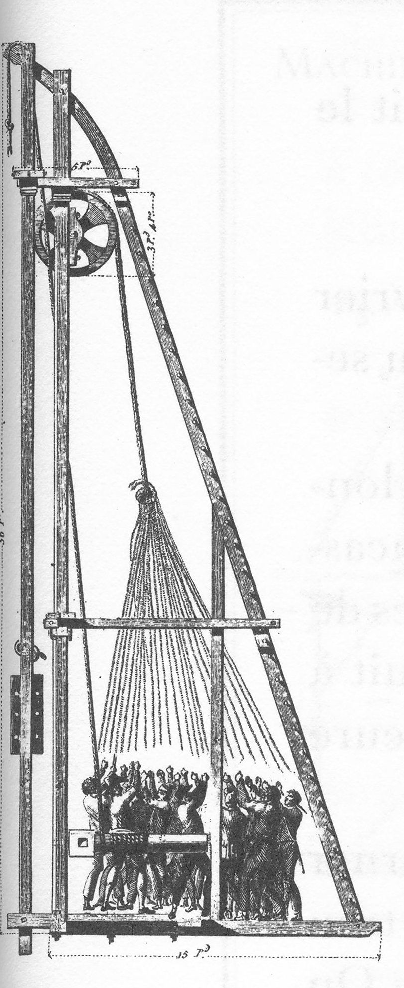 Sonnette à tiraudes, utilisée pour la construction du Pont George V, Orléans, Loiret, France